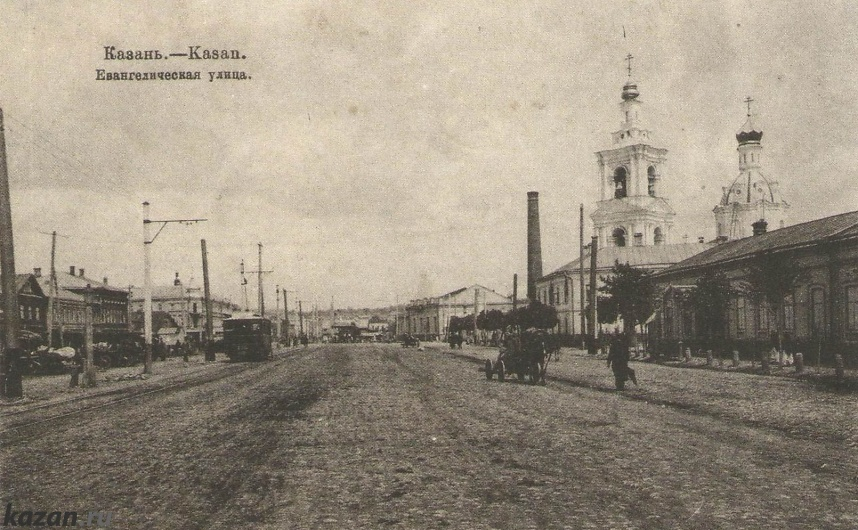 Казань конца ХIХ - начала ХХ века